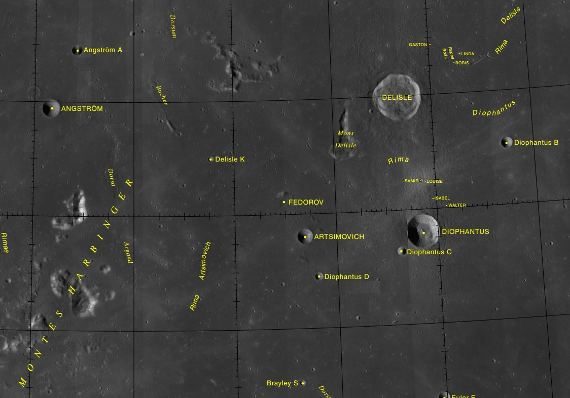 Cráter lunar Fedorov. Localización. (Imagen LRO)